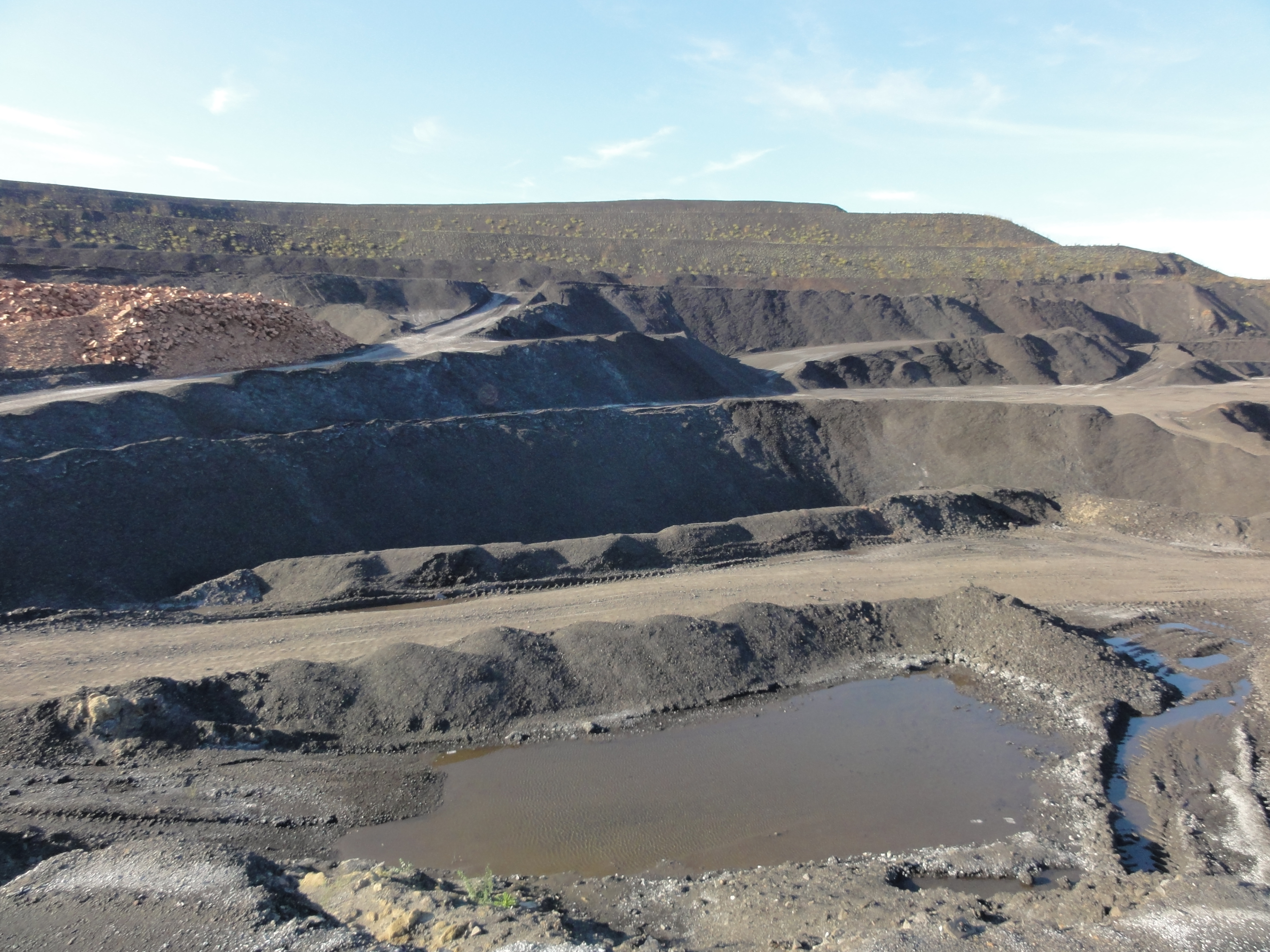 Terrils nos 94 et 94A dits Lavoir de Fouquières, Lavoir de Fouquières du Groupe d'Hénin-Liétard, Noyelles-sous-Lens, Pas-de-Calais, Nord-Pas-de-Calais, France.